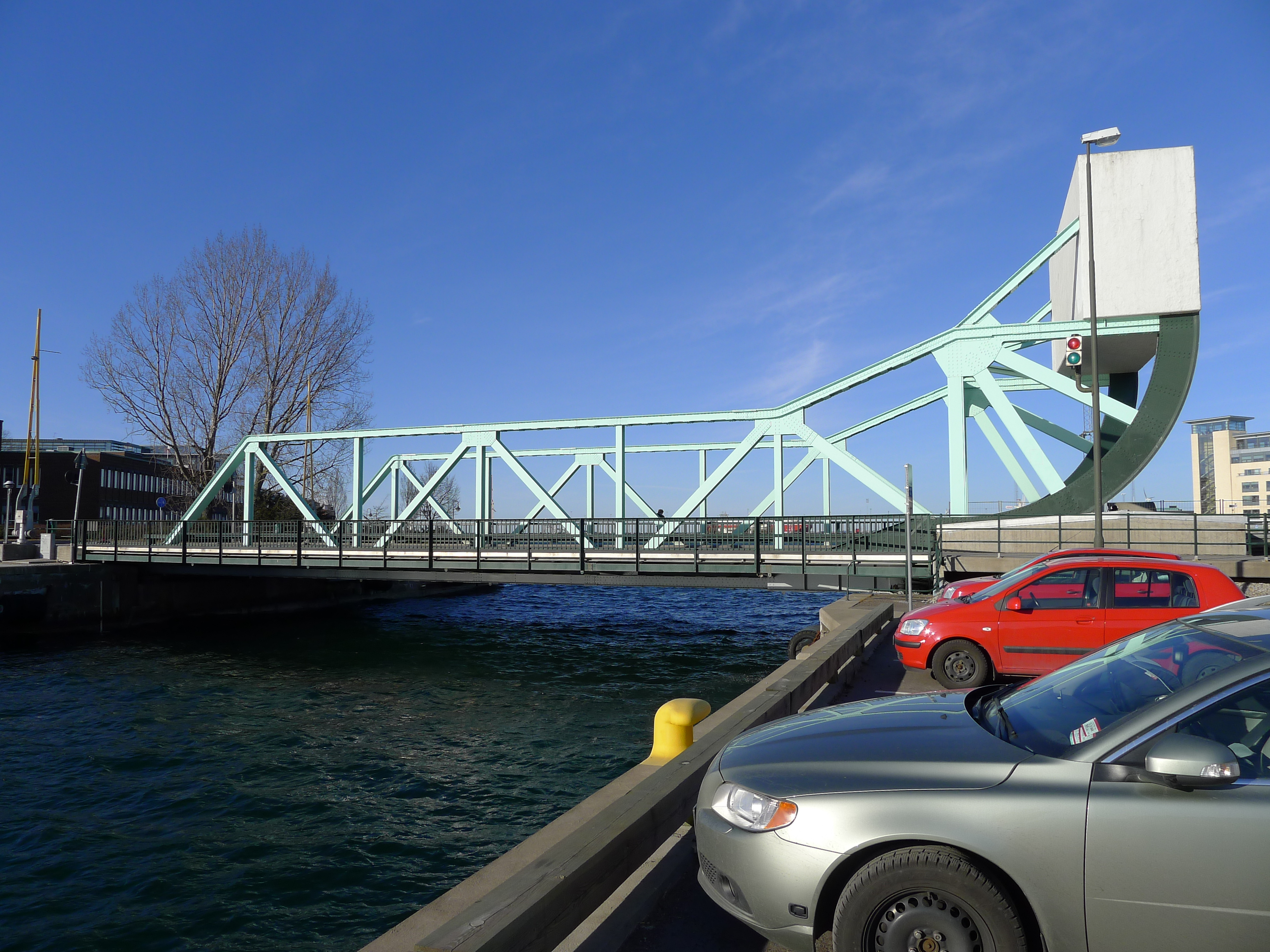 Klaffbron i Malmö. En rörlig nitad fackverksbro, uppförd 1953, vilken ursprungligen var en järnvägsbro.